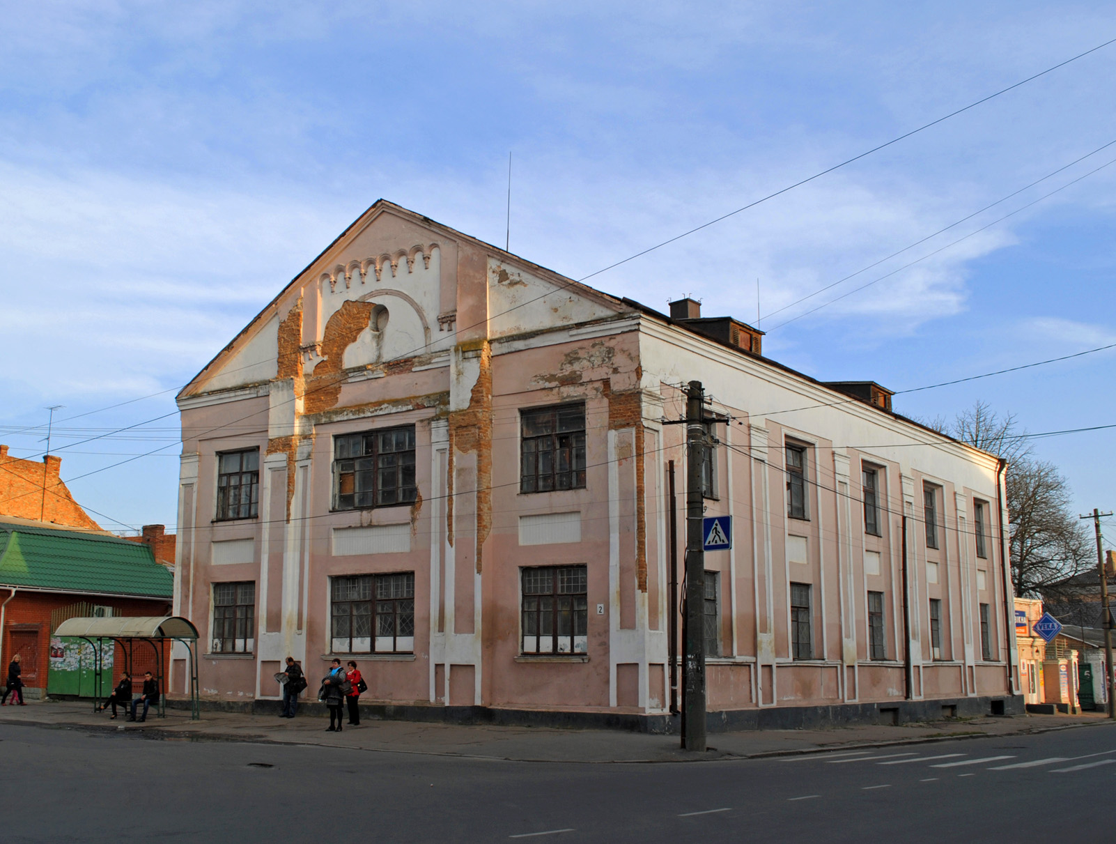 Синагога, Бердичів, вул. Вінницька, 8 (колишня вул. Свердлова, 8)